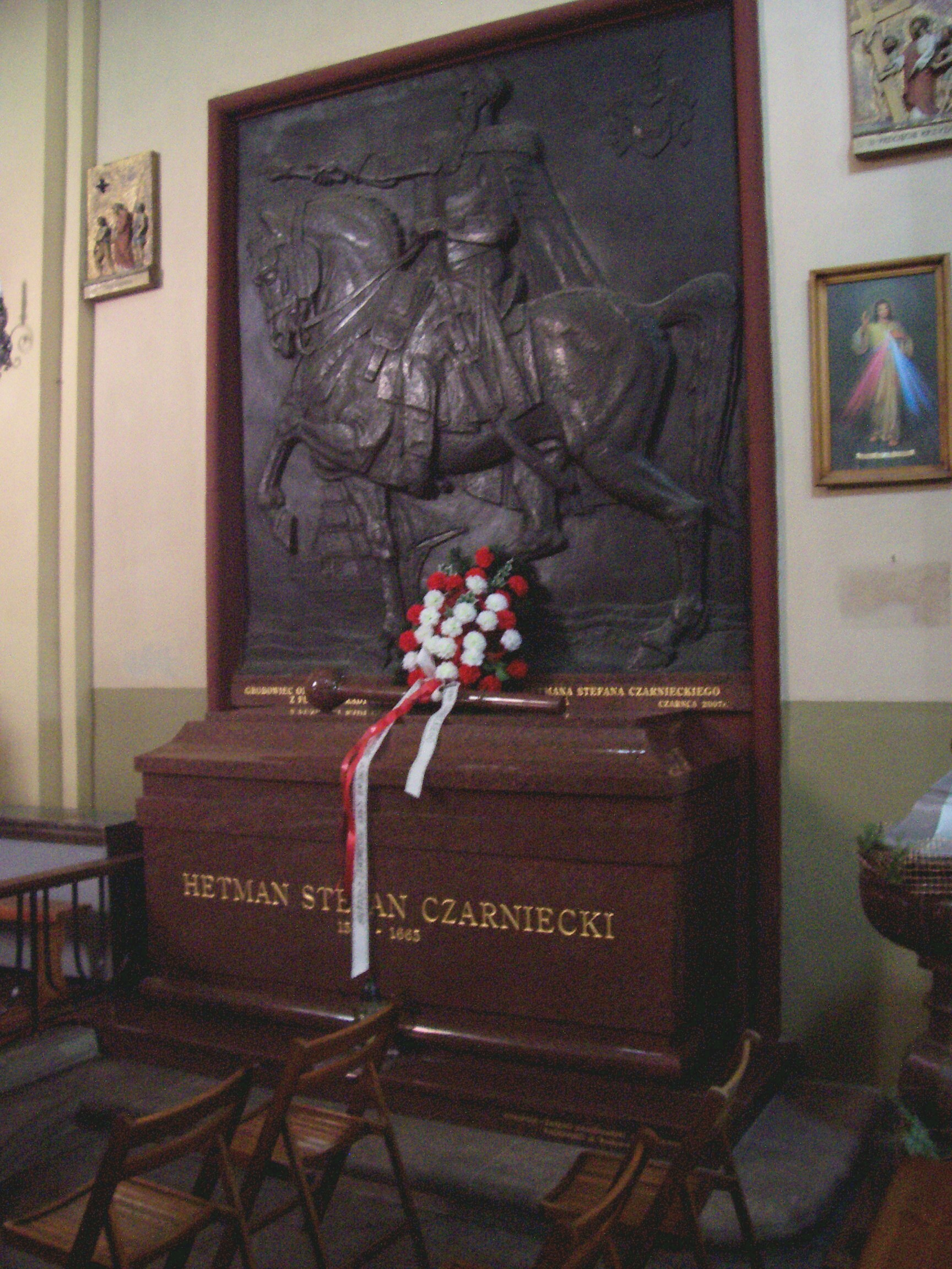 Sarkofag hetmana Stefana Czarnieckiego w kościele w Czarncy